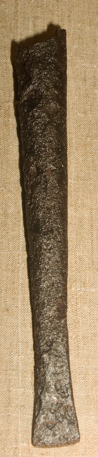 Пешня. (железо). Гродище Городец. Лужский район, Ленинградская область. Государственный музей истории Санкт-Петербурга.